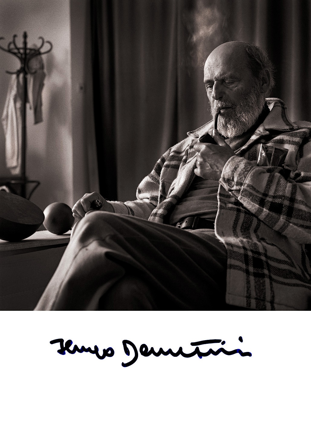 Jiří Jiroutek´s picture Cyklus: Osobnosti